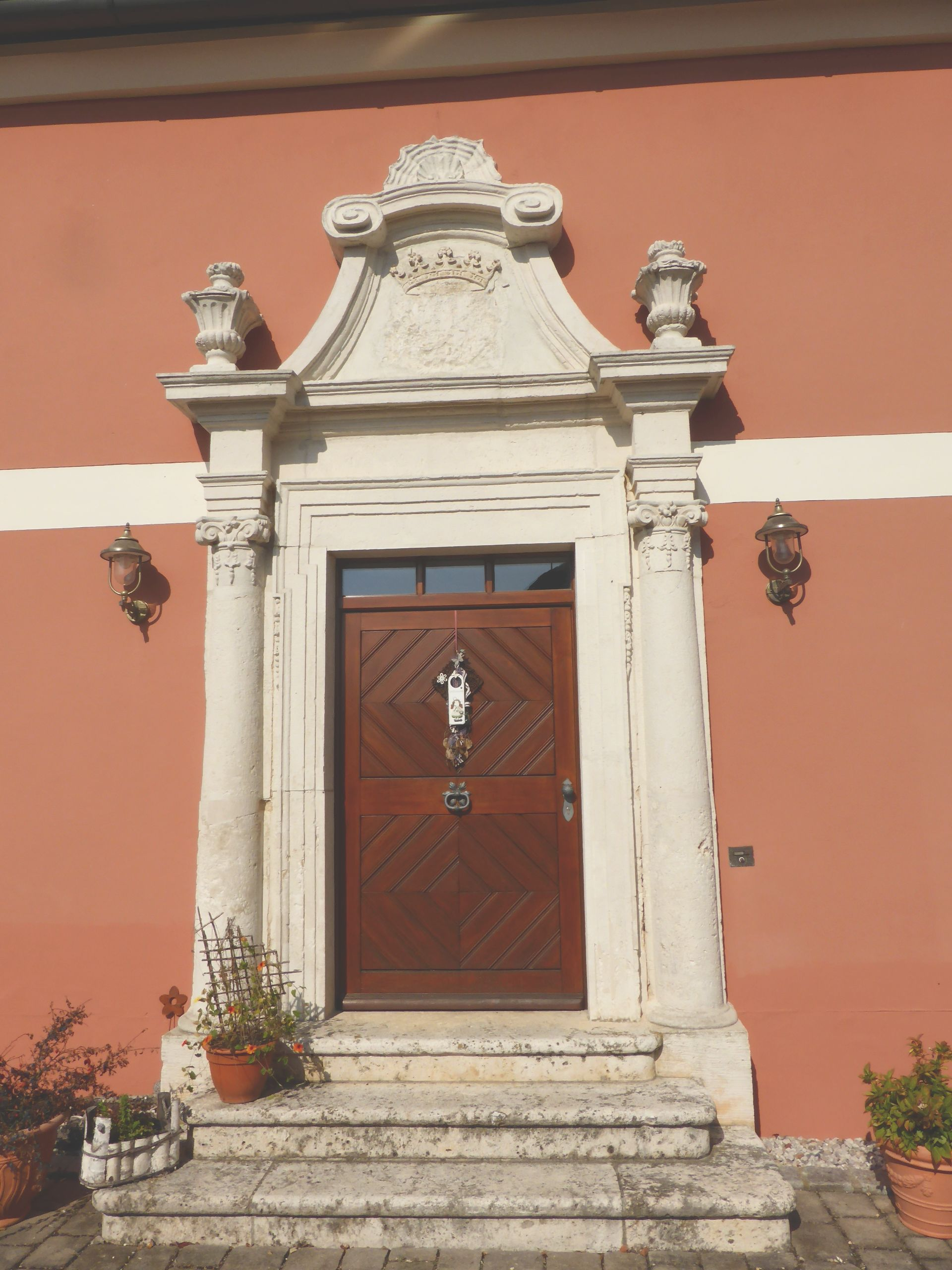 Schloss Holzheim am Forst, Portal mit wohl ausgeschlagenem Wappen (Krone noch erhalten)